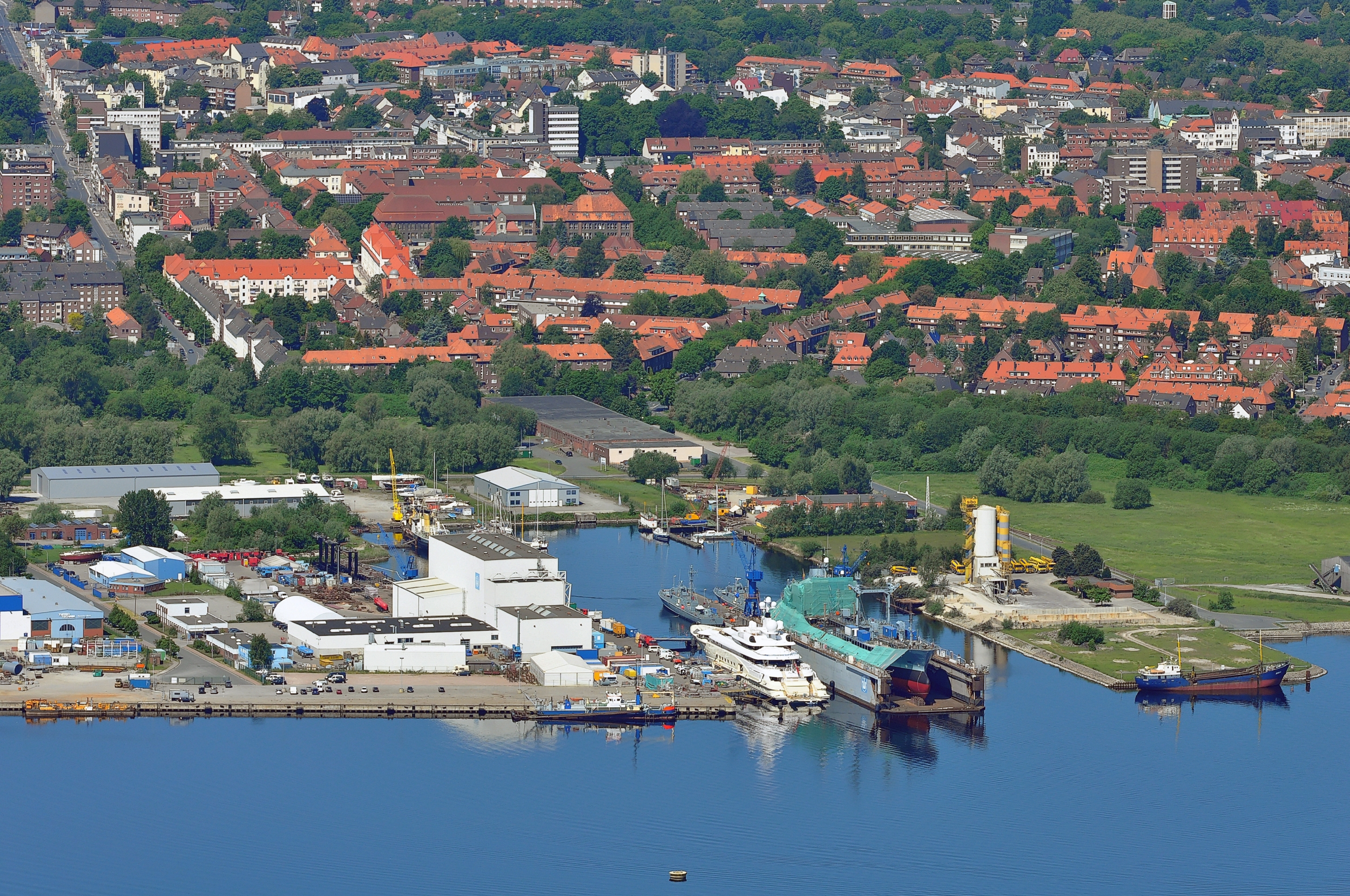 Luftbilder von der Nordseeküste 2012-05